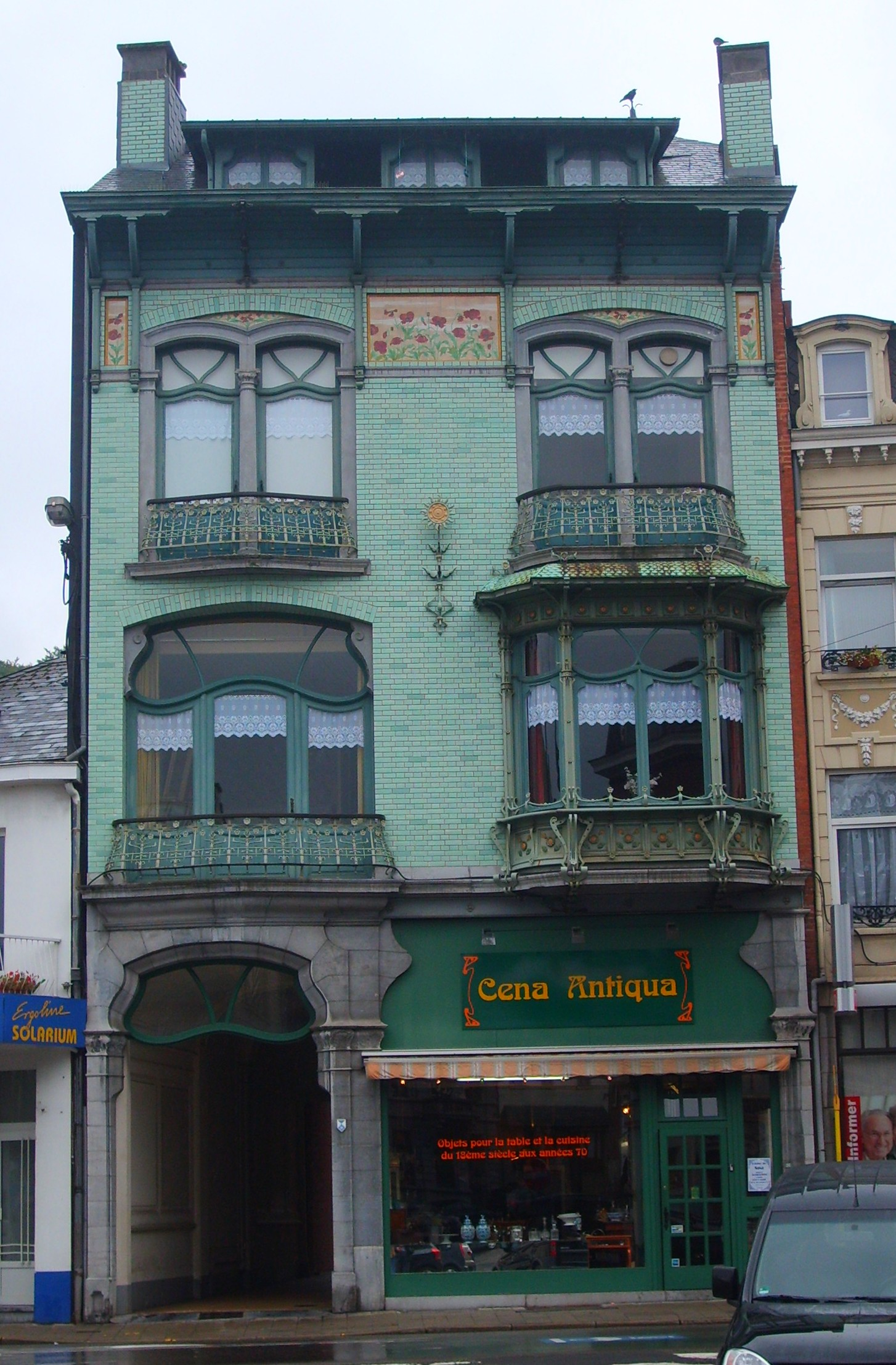 Maison Charlier, construite en 1900 par l'architecte Gustave Charlier (1848-1922)